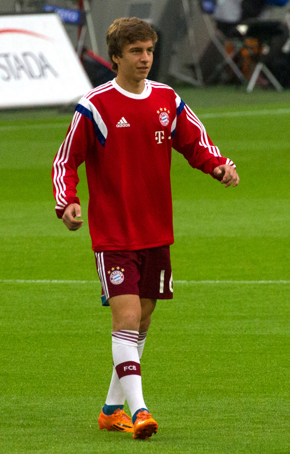 S04 - FCB (44 von 133)